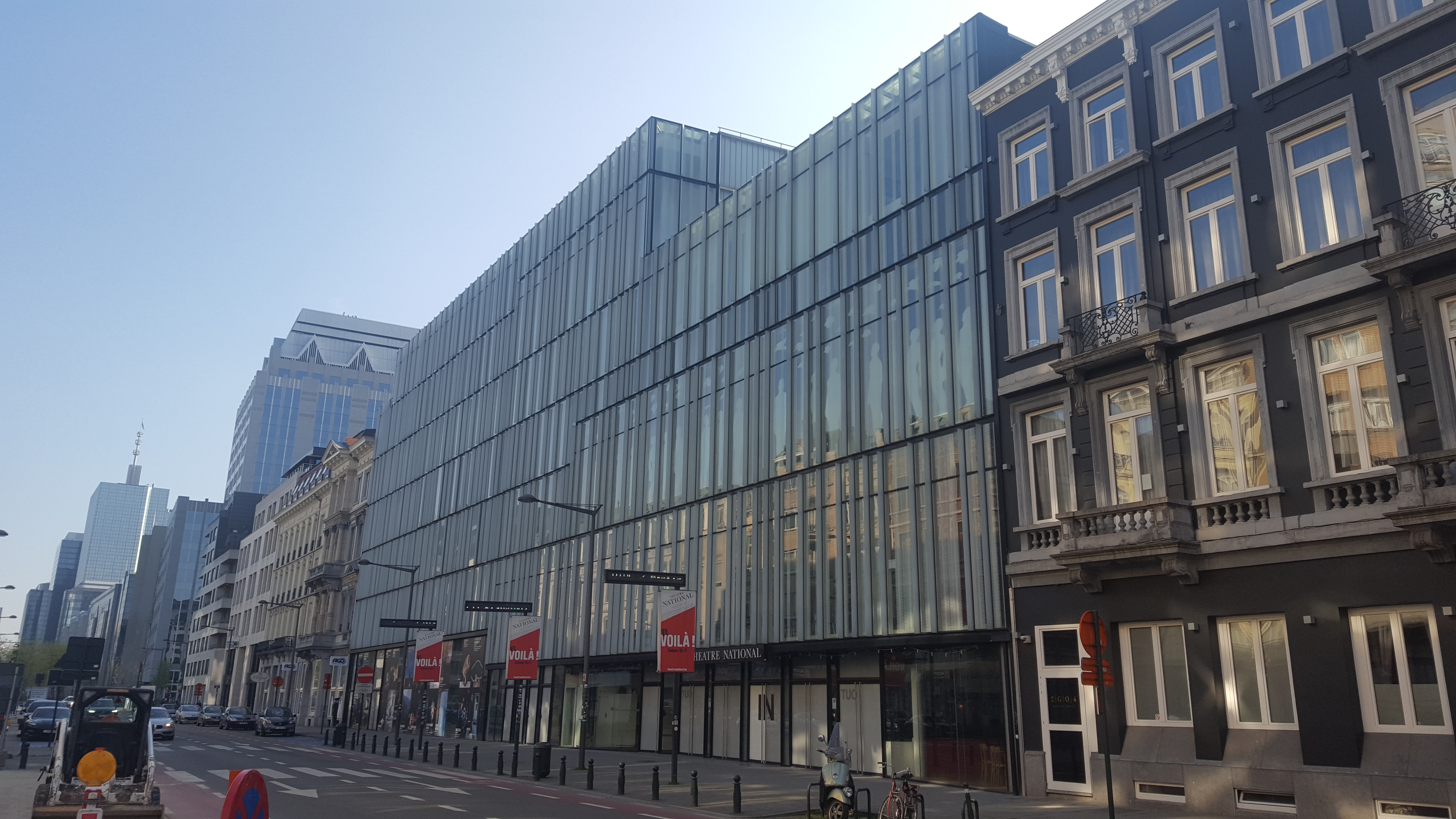 Théâtre national de la Communauté française, Brussels